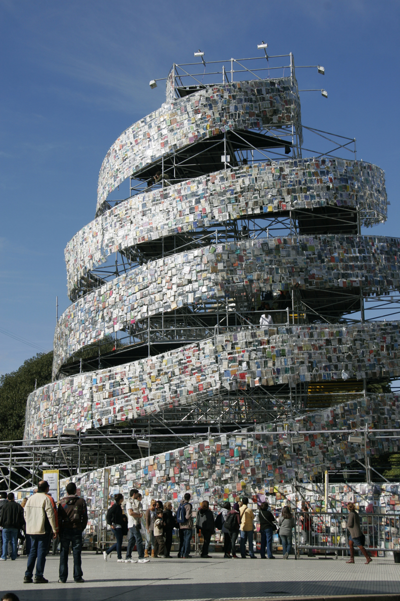 El miércoles 18 de mayo quedó inaugurada en la Plaza San Martín, La Torre de Babel de Libros, una obra de Marta Minujín. ( Foto: Estrella Herrera)